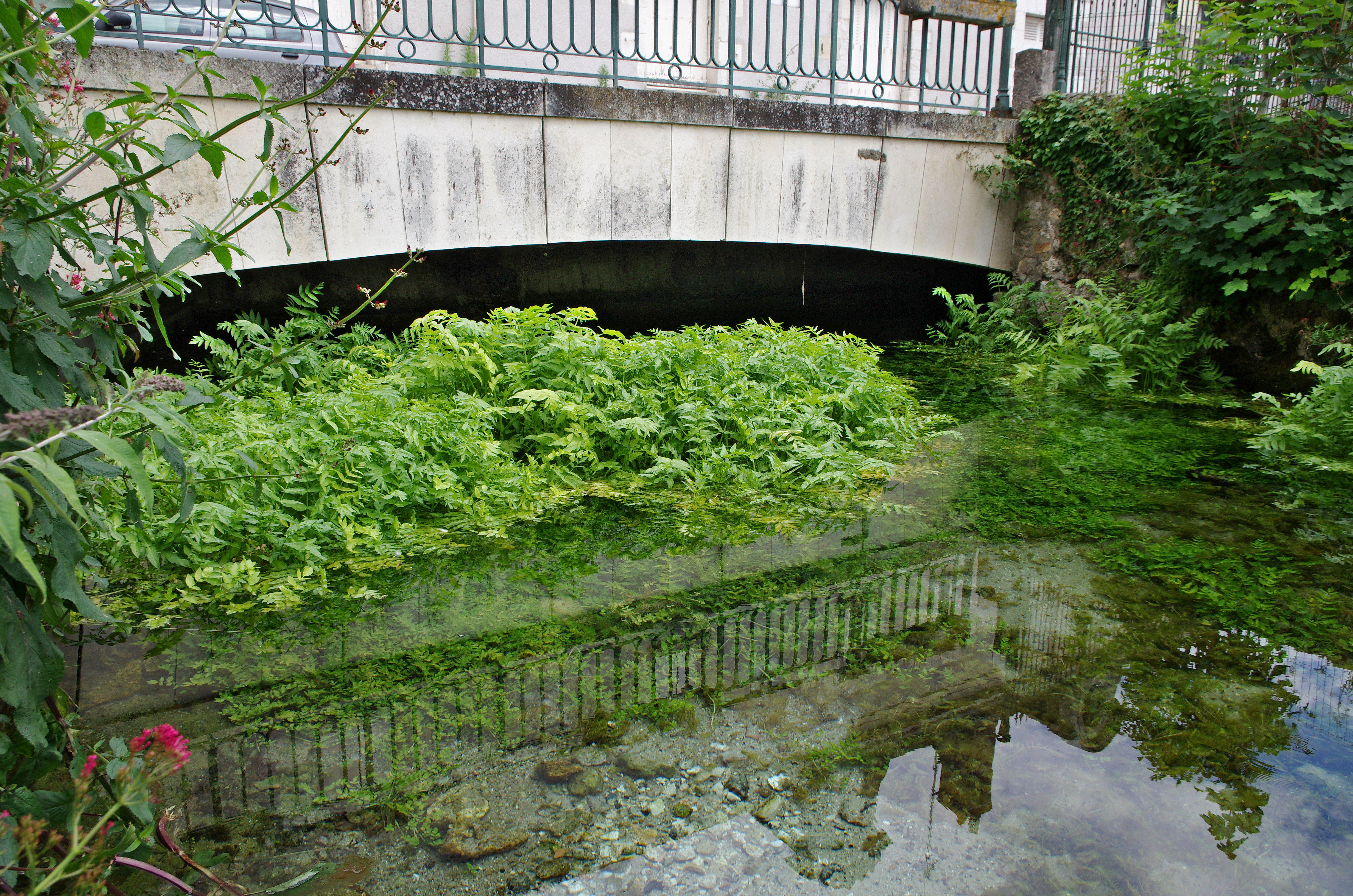 Truyes (Indre-et-Loire). Exsurgence qui sort d'une cavité au milieu du village. Cette exsurgence des eaux pluviales du plateau calcaire donne naissance à un petit ruisseau (500m) qui se jette dans l'Indre. Truyes est probablement un dérivé du latin populaire " traucum", "trou, cavité". Au XVIIIe siècle, la forme "Truies ou Truis" est attestée. Les habitants on finit par préférer la graphie avec un "y", probablement pour éviter un nom de commune peu flatteur. Le ruisseau lui-même aurait le nom de "Truyes"".